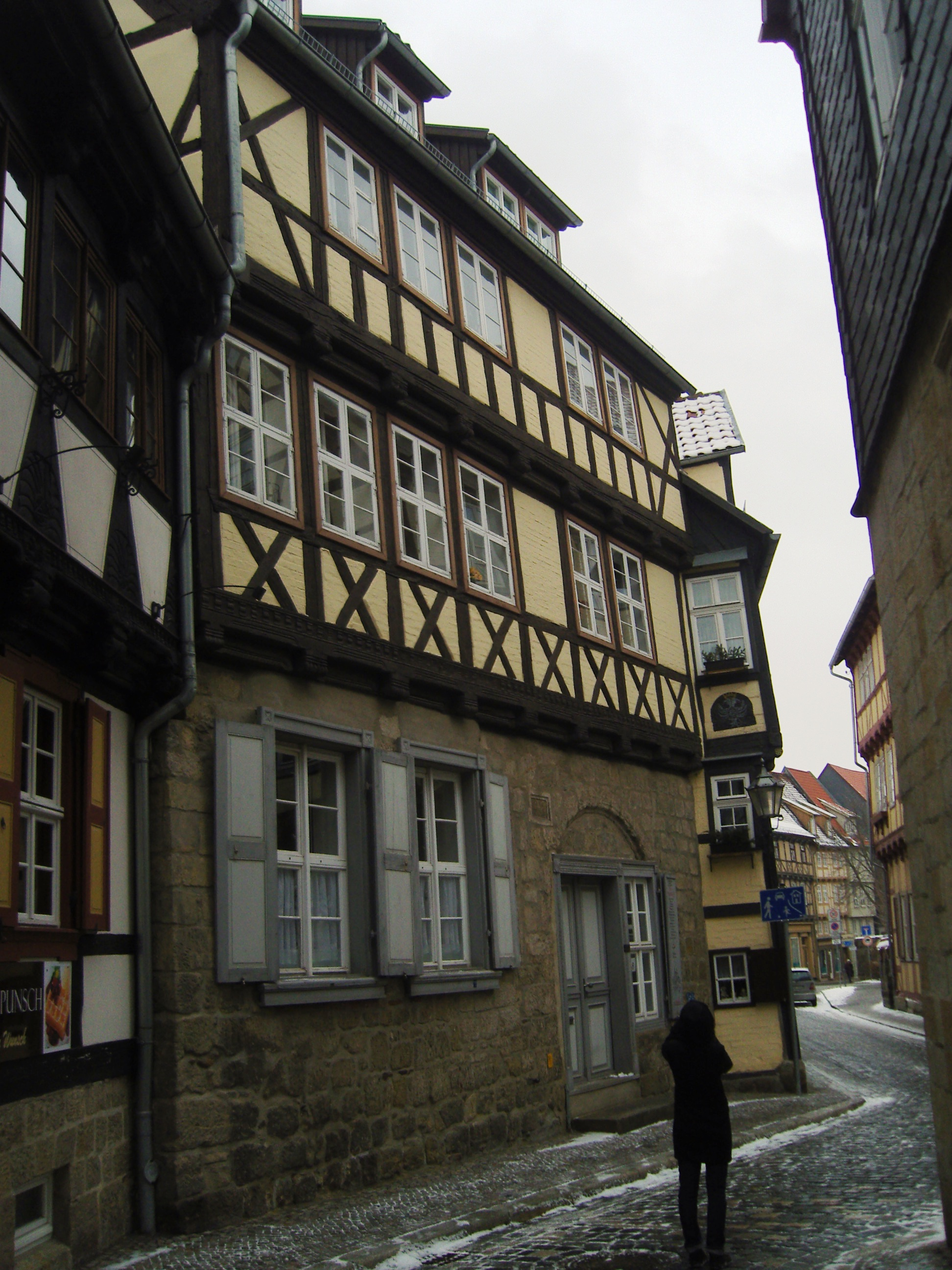 Denkmalgeschütztes Wohnhaus in der Langen Gasse 28 in Quedlinburg